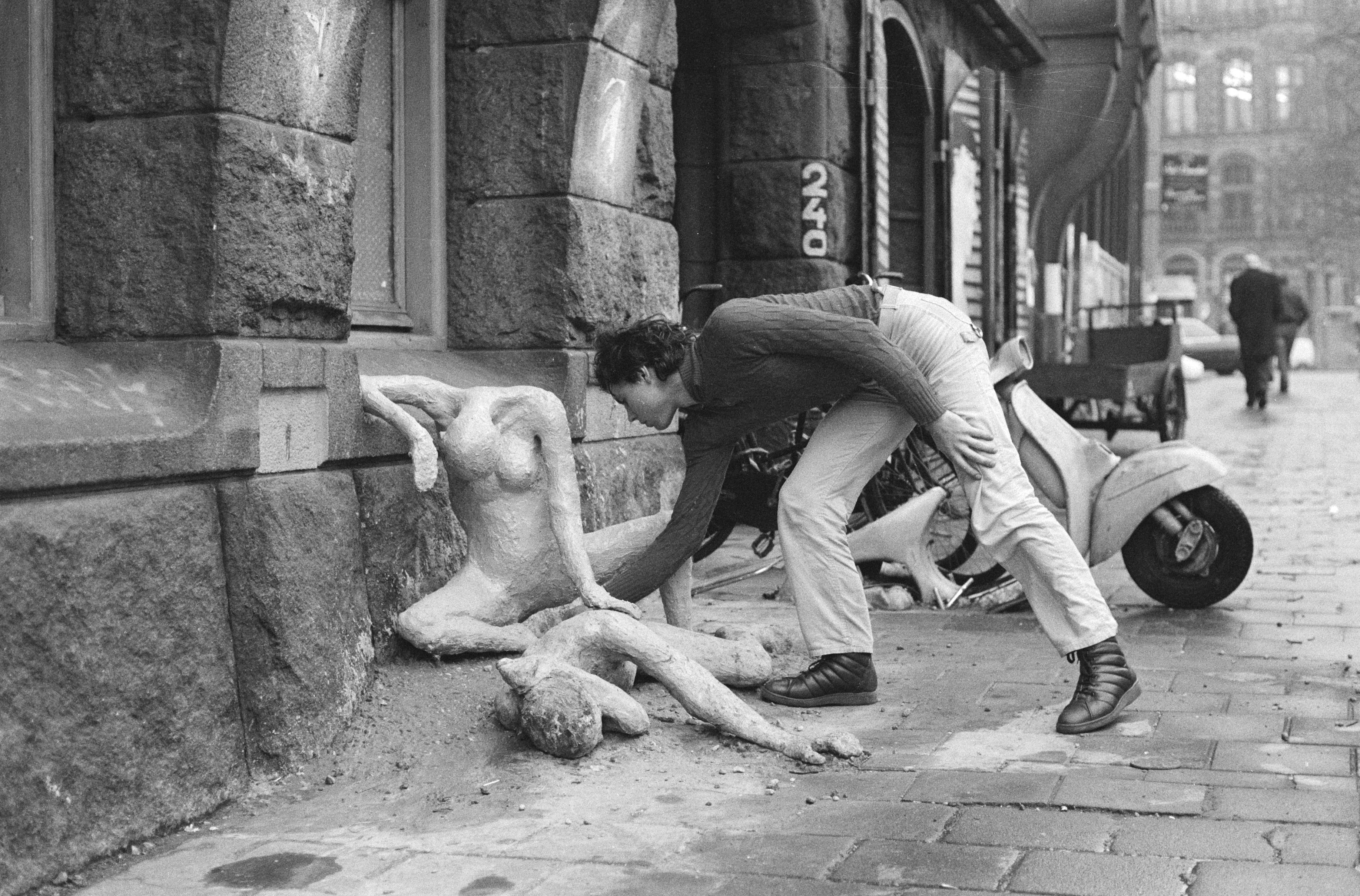 Collectie / Archief : Fotocollectie Anefo Reportage / Serie : [ onbekend ] Beschrijving : Pompei-figuren in plaveisel A'damse Nieuwezijds Voorburgwal, kunstwerk die mensen wil attenderen op gevaren voor burgers bij atoomramp Datum : 27 november 1980 Locatie : Amsterdam, Noord-Holland Trefwoorden : PLAVEISELS, kunstwerken Persoonsnaam : david veldhoen Fotograaf : Dijk, Hans van / Anefo Auteursrechthebbende : Nationaal Archief Materiaalsoort : Negatief (zwart/wit) Nummer archiefinventaris : bekijk toegang 2.24.01.05 Bestanddeelnummer : 931-1749